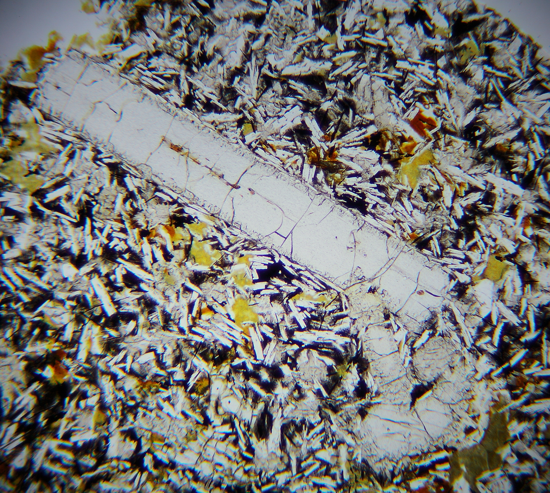 Enstatitkristalle in tholeiitischem Basalt aus dem vorderen Vogelsberg (Dünnschliff, LPL)